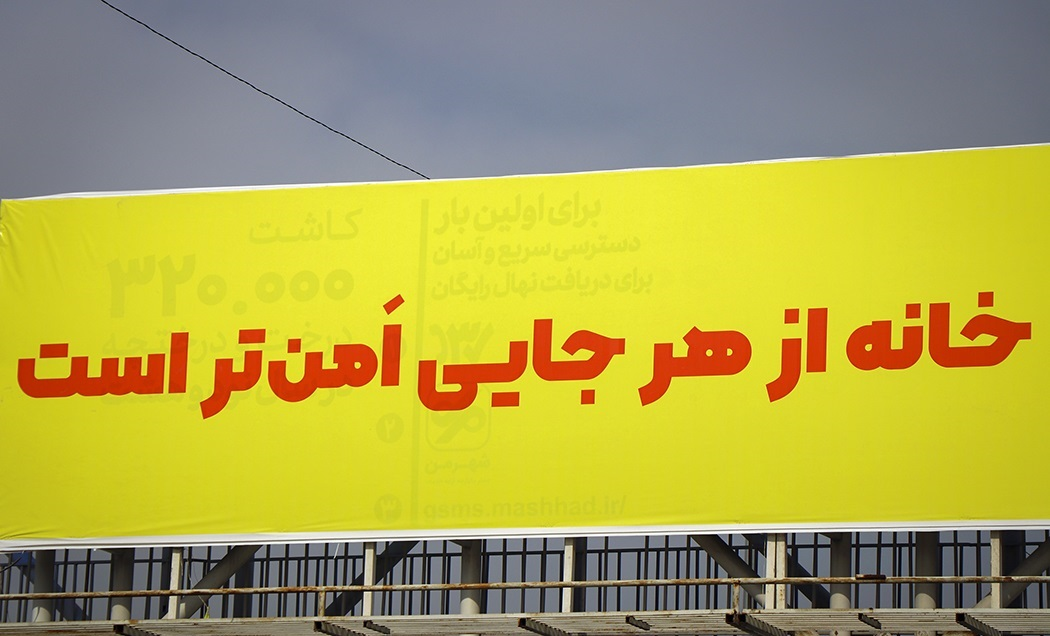 هشدارهای «کرونایی» در شهر